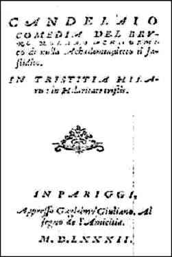 frontespizio Candelaio di Giordano Bruno, Parigi 1582